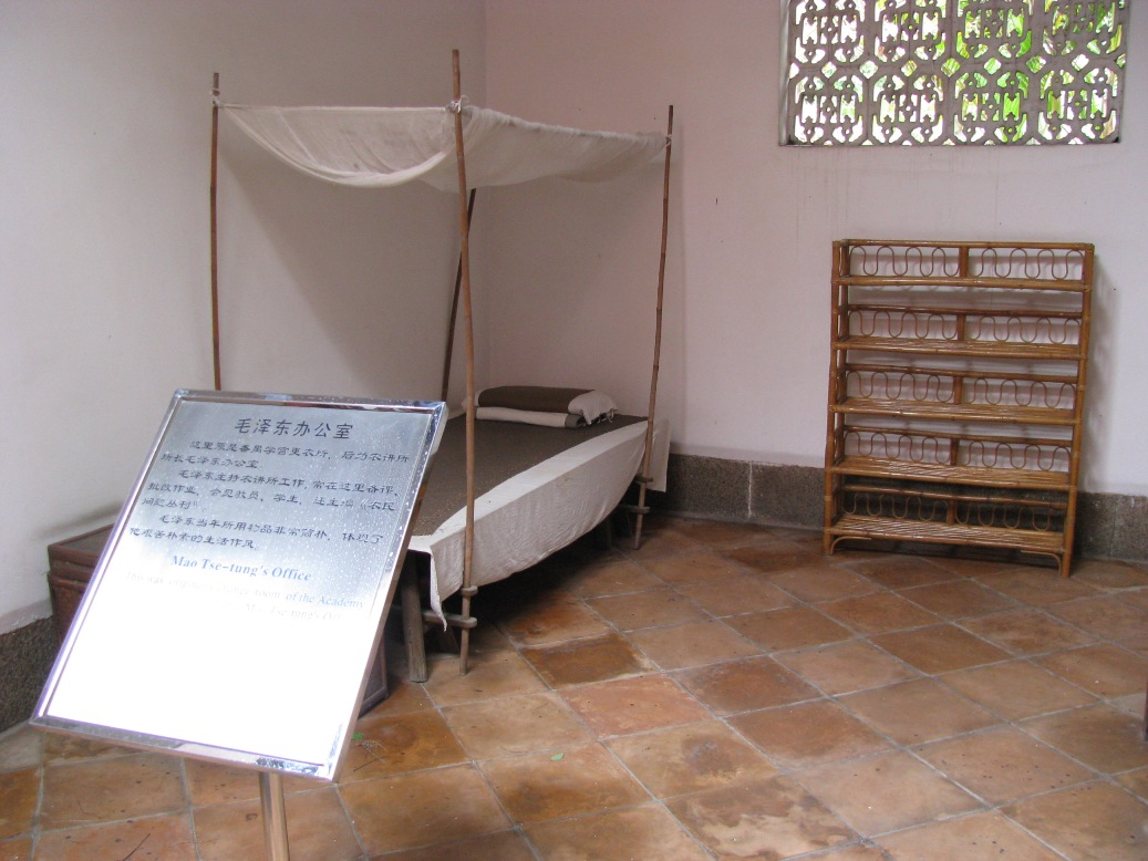 Mao's room in Nongjiang Suo Guangzhou, China.中国广州农讲所毛泽东办公室兼卧室。